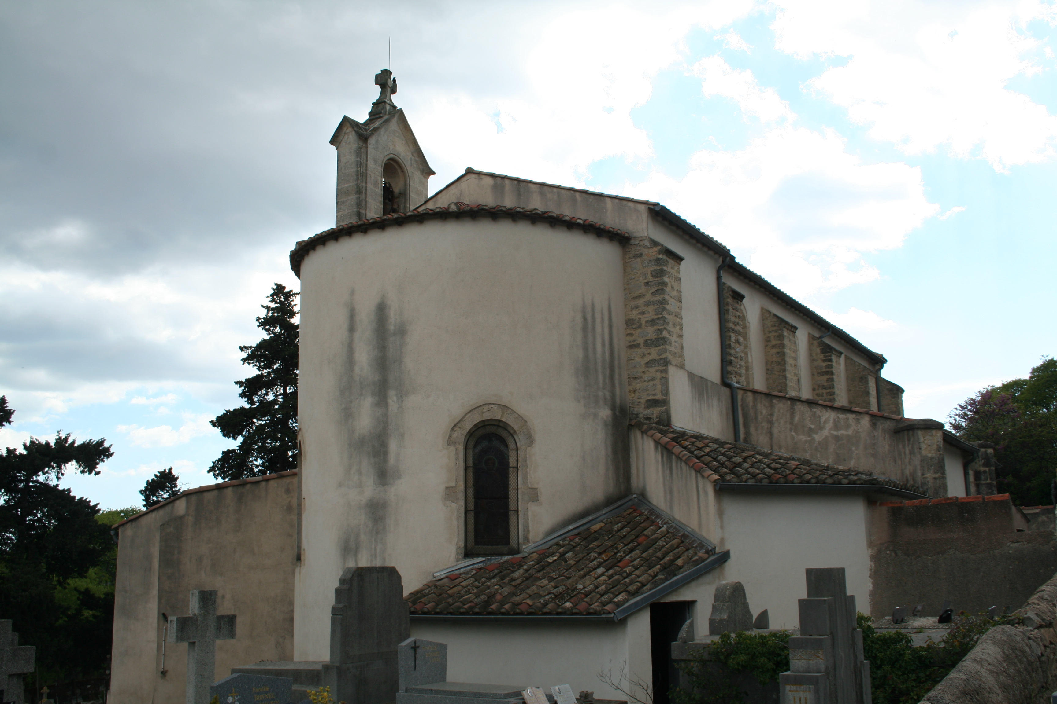 Cournonsec (Hérault) - chevet de l'église Saint-Christophe.